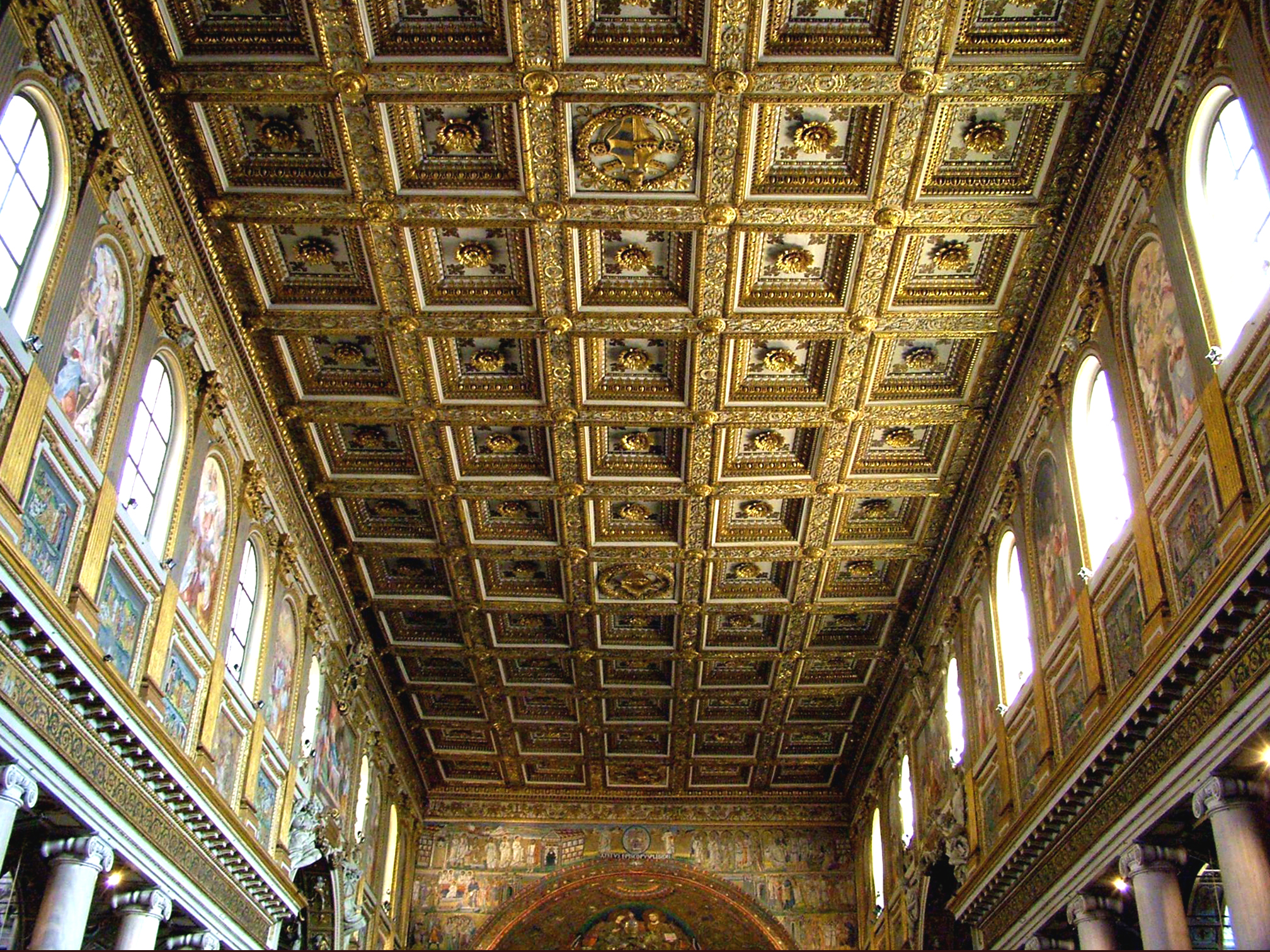 A főhajó aranyozott kazettás mennyezete